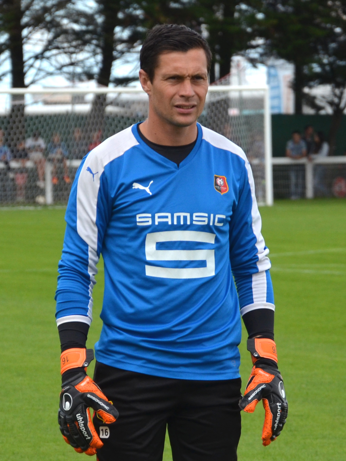 Photographie prise lors d'un entraînement du Stade rennais délocalisé à Dinan. Ici, Olivier Sorin.